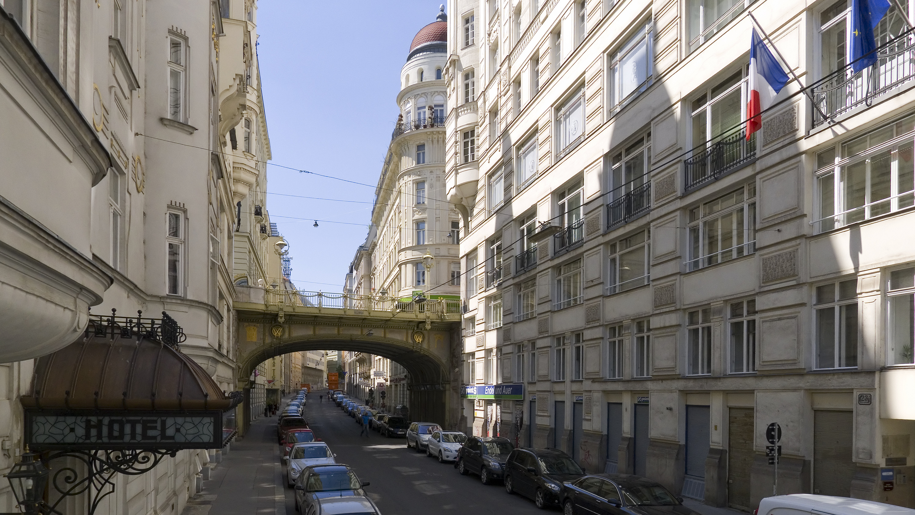 Tiefer Graben bei Nr. 30 Richtung Südwesten